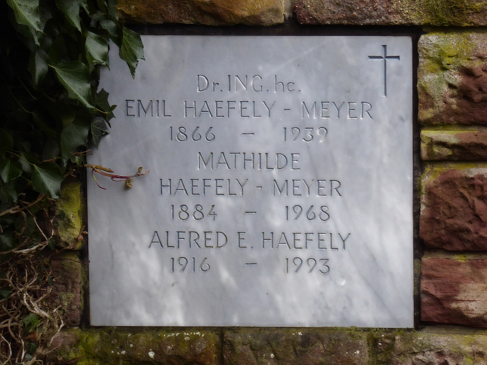 Emil Häfely -Meyer (1866–1939), Dr.Ing.h.c. Fabrikant für elektrische Isoliertechnik, Politiker, Familiengrab auf dem Friedhof Hörnli, Riehen, Basel-Stadt